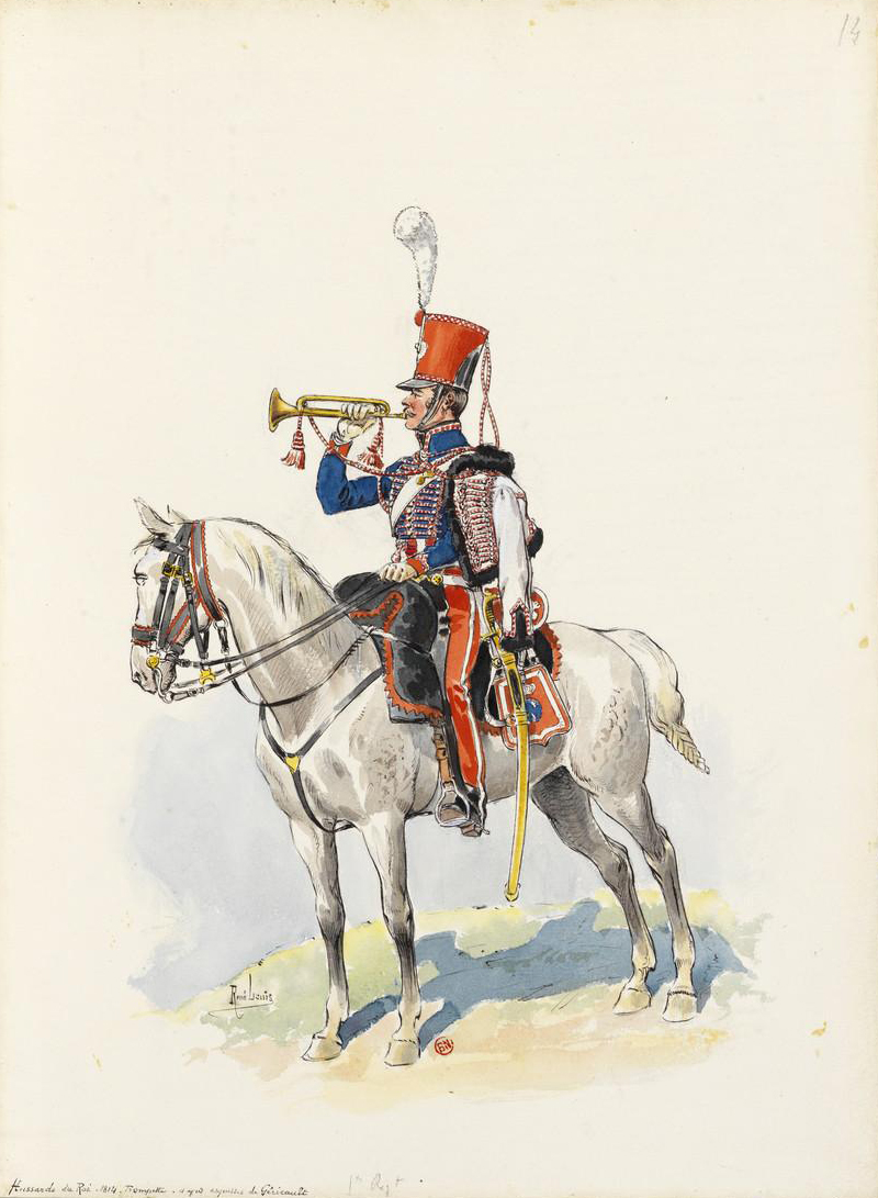 Trompette des Hussards du roi (1er régiment) en 1814